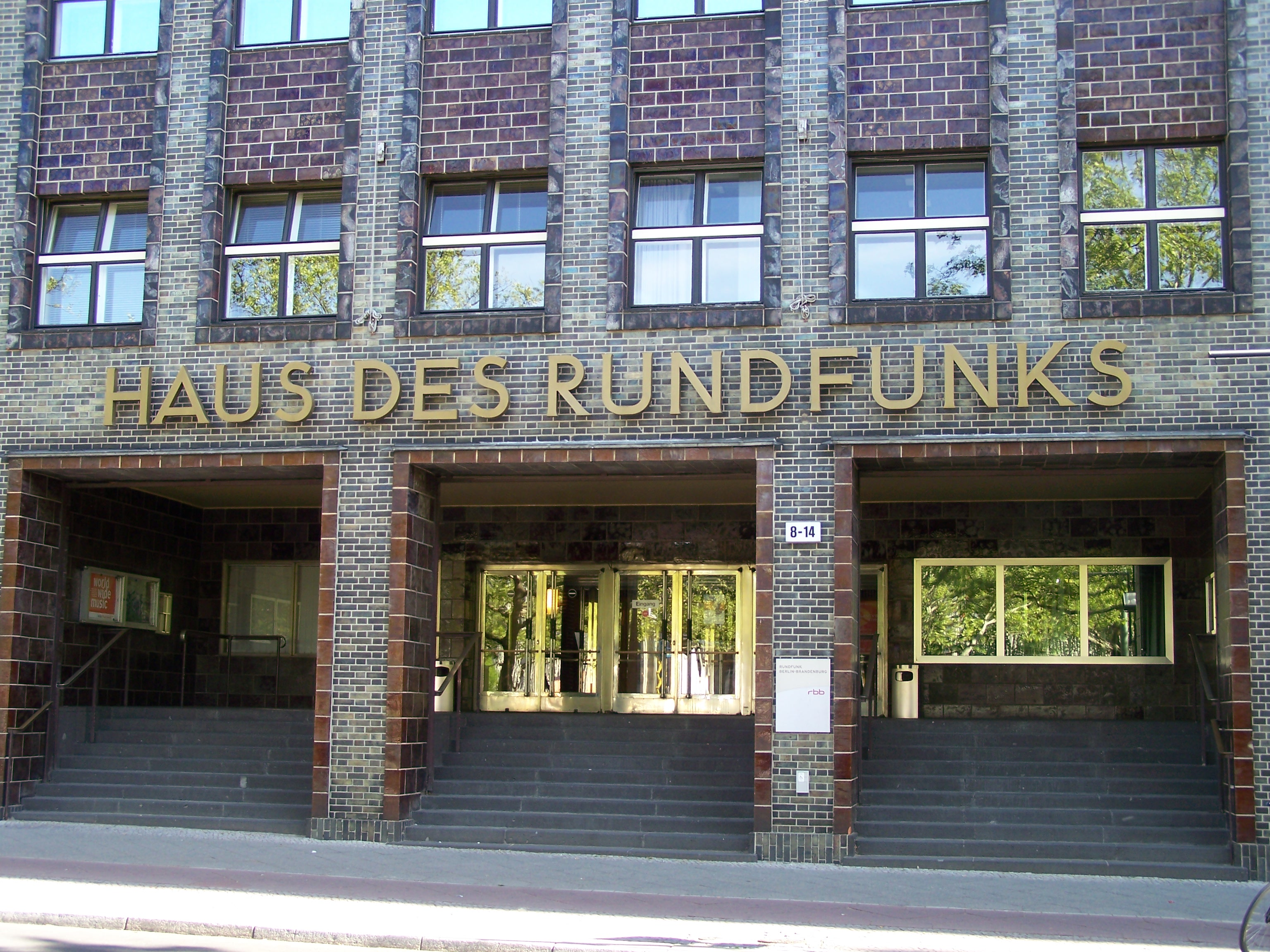 Haus des Rundfunks in Berlin-Charlottenburg